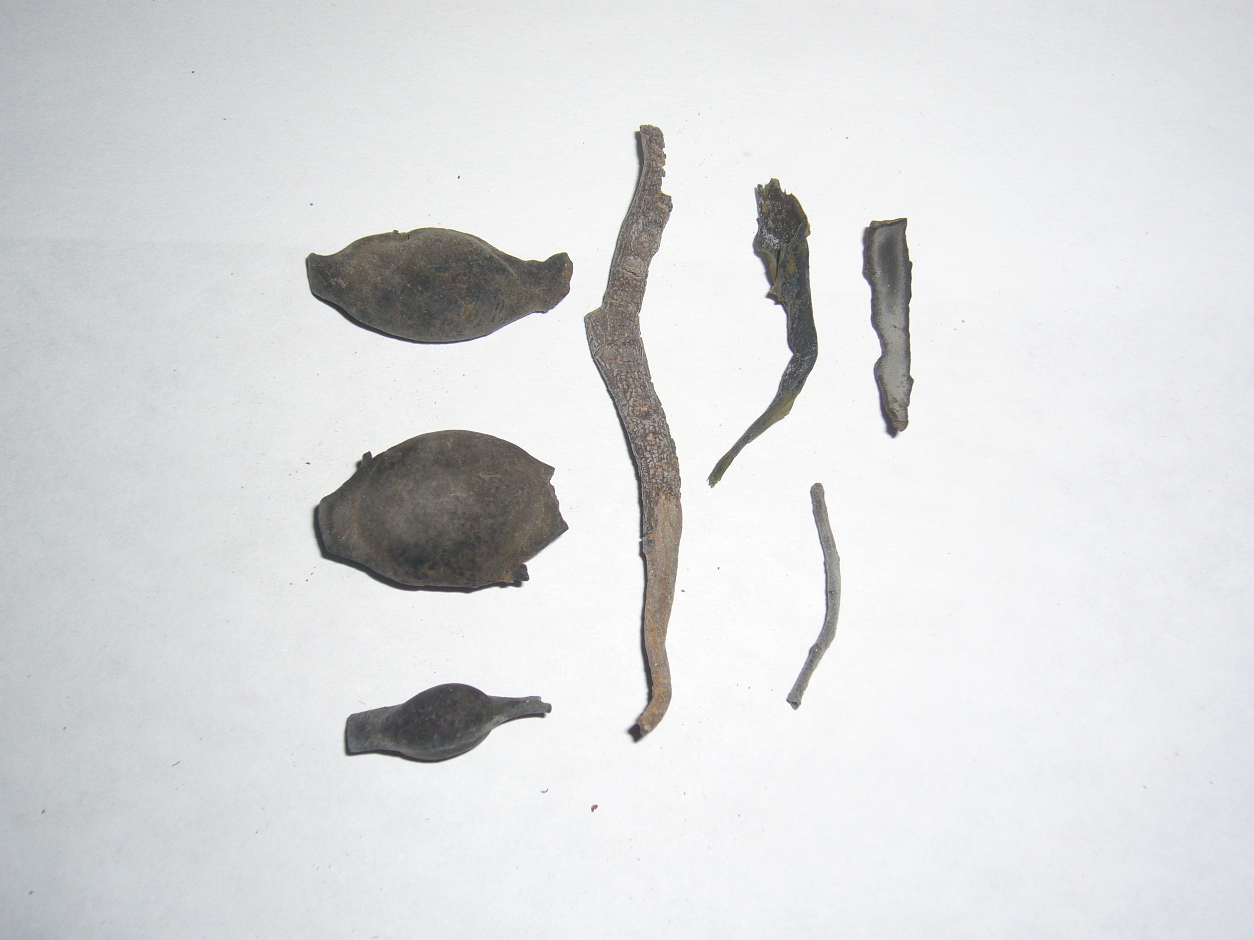 Aerocistos y talo de Ascophyllum nodosum